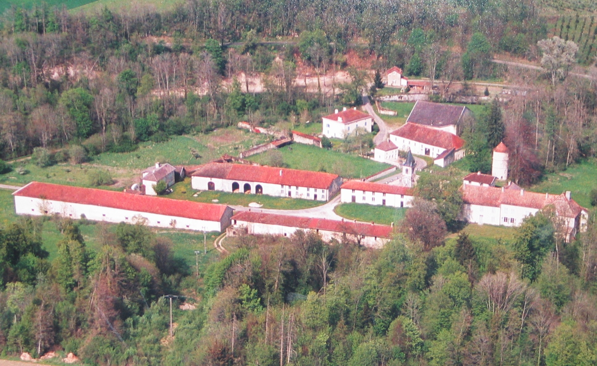 Bovenaanzicht van het dorp Bertheleville